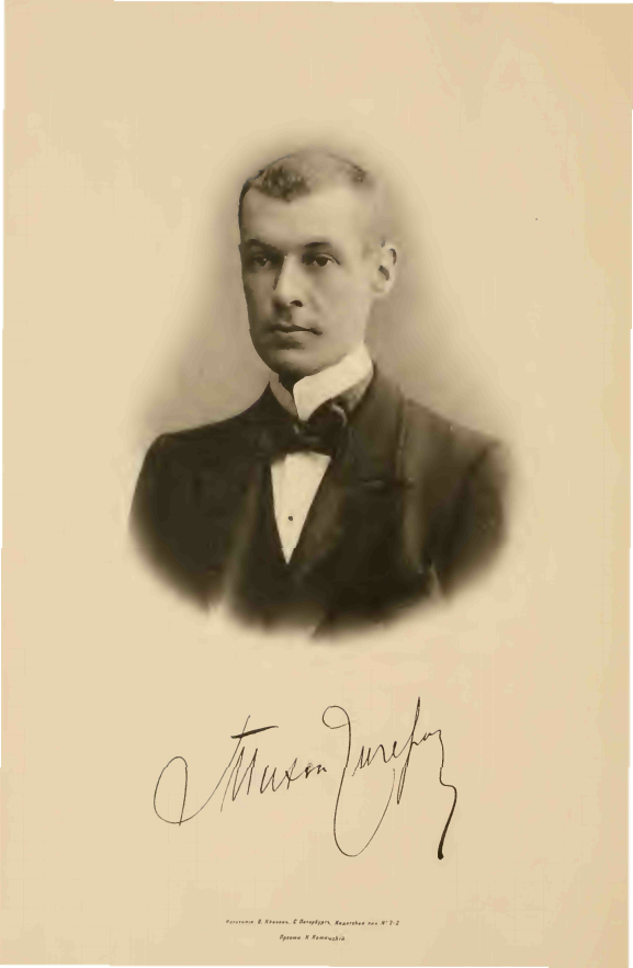 портрет Чичерин (1869—1904)